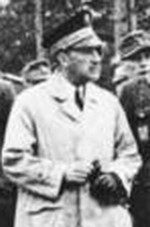 Title: Katyn, Öffnung der Massengräber, Gräber polnischer Generale Extra information: Rußland-Mitte, Katyn.- Öffnung der Massengräber von im Frühjahr 1940 in sowjetischer Kriegsgefangenschaft ermordeten polnischen Offizieren People in the image: Brinon, Fernand de Graf: Botschafter, Publizist, Frankreich Factual corrections and alternative descriptions are encouraged separately from the original description. Additionally errors can be reported at this page to inform the Bundesarchiv. Original historic description: Zentralbild II. Weltkrieg 1939 - 45 U. B. z: den französischen Botschafter in Berlin, Fernand de Brinon, der die Stätte des Massenmordes im Wald von Katyn besichtigt. Hier an den Gräbern von zwei bereits in Einzelgräbern umgebetteten polnischen Generalen. April 1943